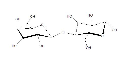 Laktoos on disahhariid, mis koosneb galaktoosist ja glükoosist, mis on omavahel ühendatud β-1→4 glükosiidsidemega.